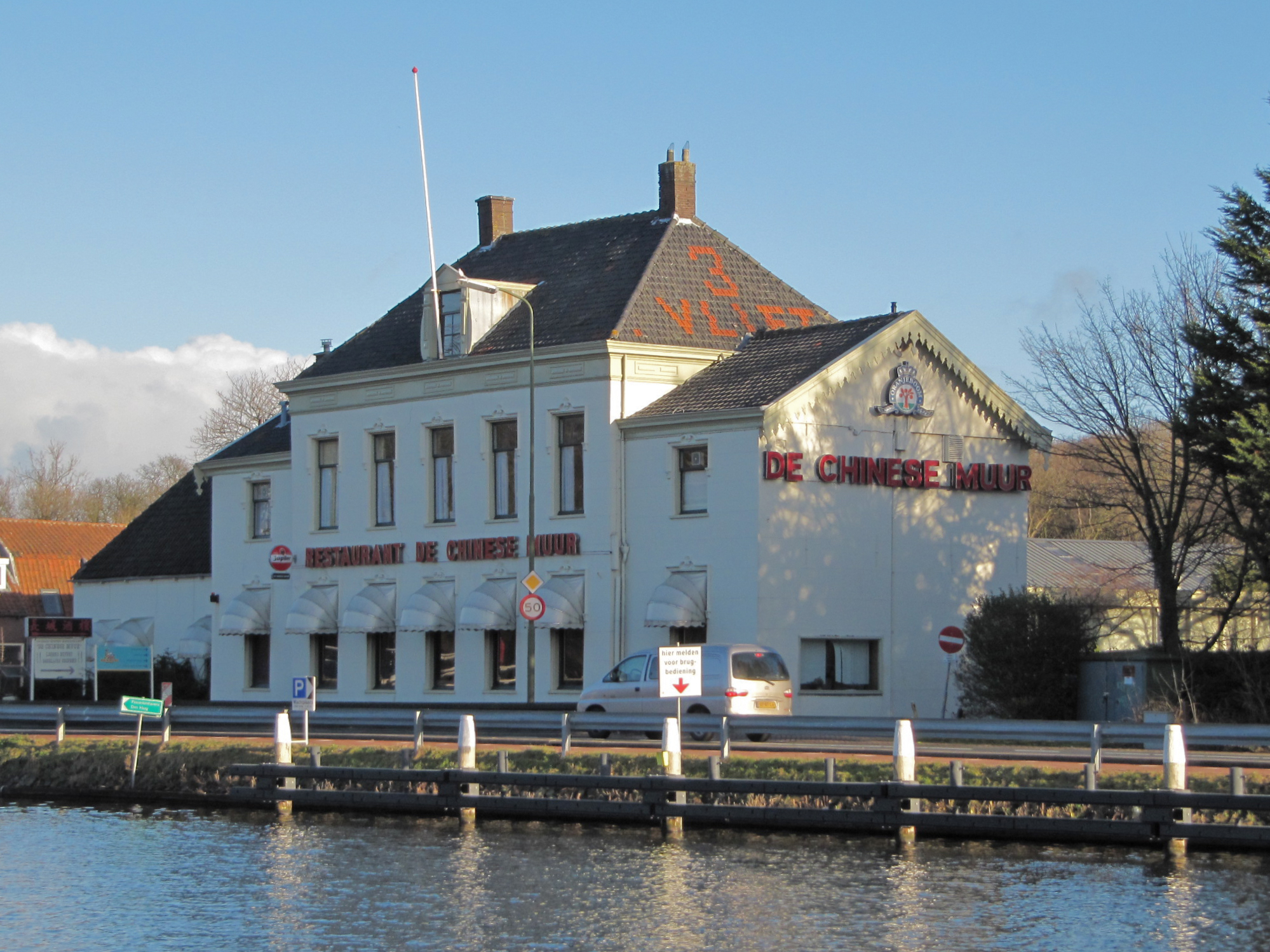 RM20057 Drievliet